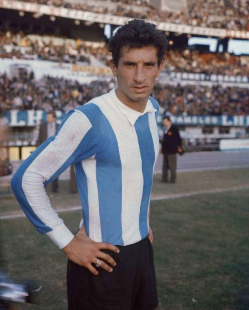 Antonio Rattin con la Selección Argentina